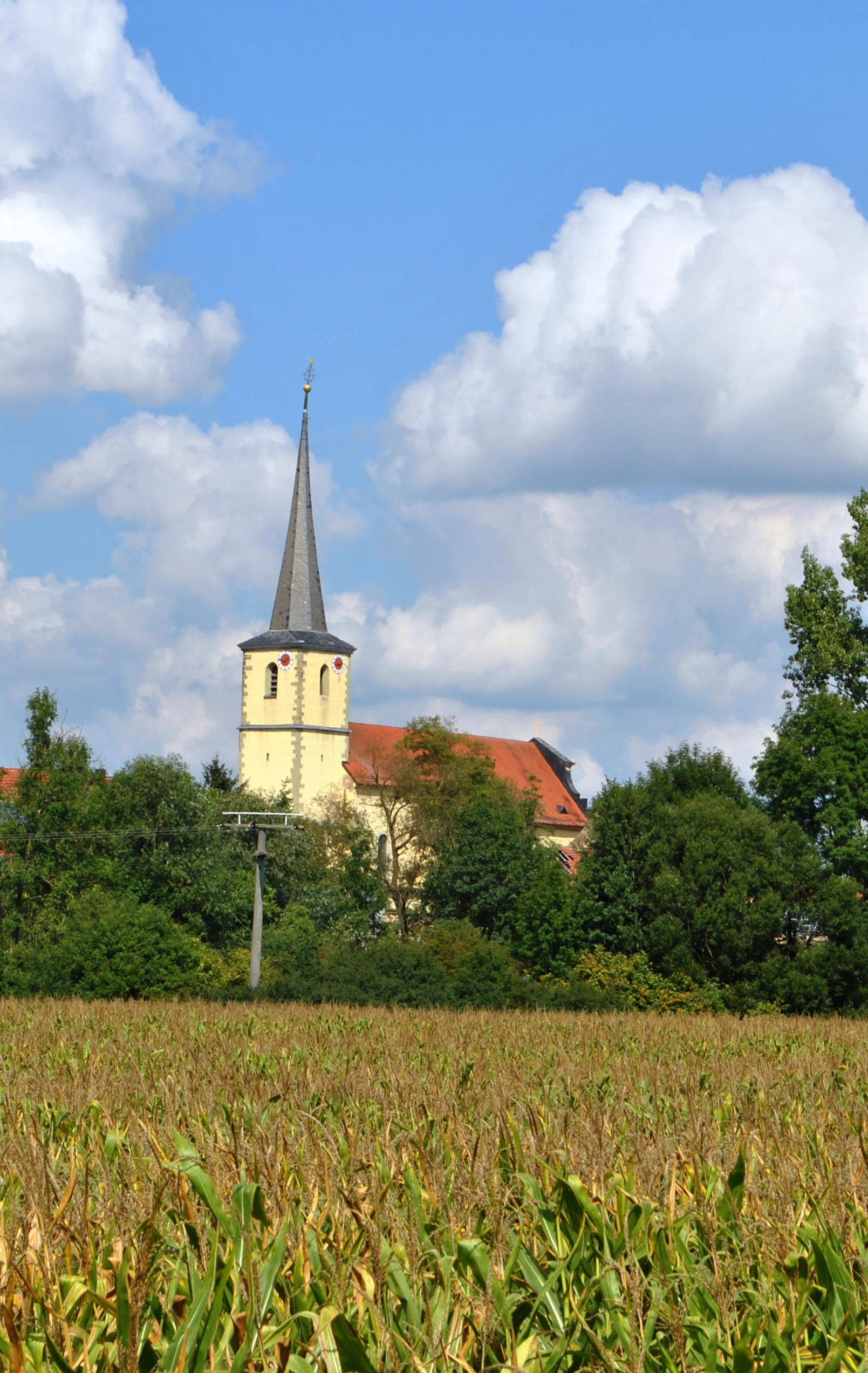 Katholische Pfarrkirche St. Bartholomäus Turm 1497, Langhaus und Chor 1804; mit AusstattungThis is a photograph of an architectural monument.